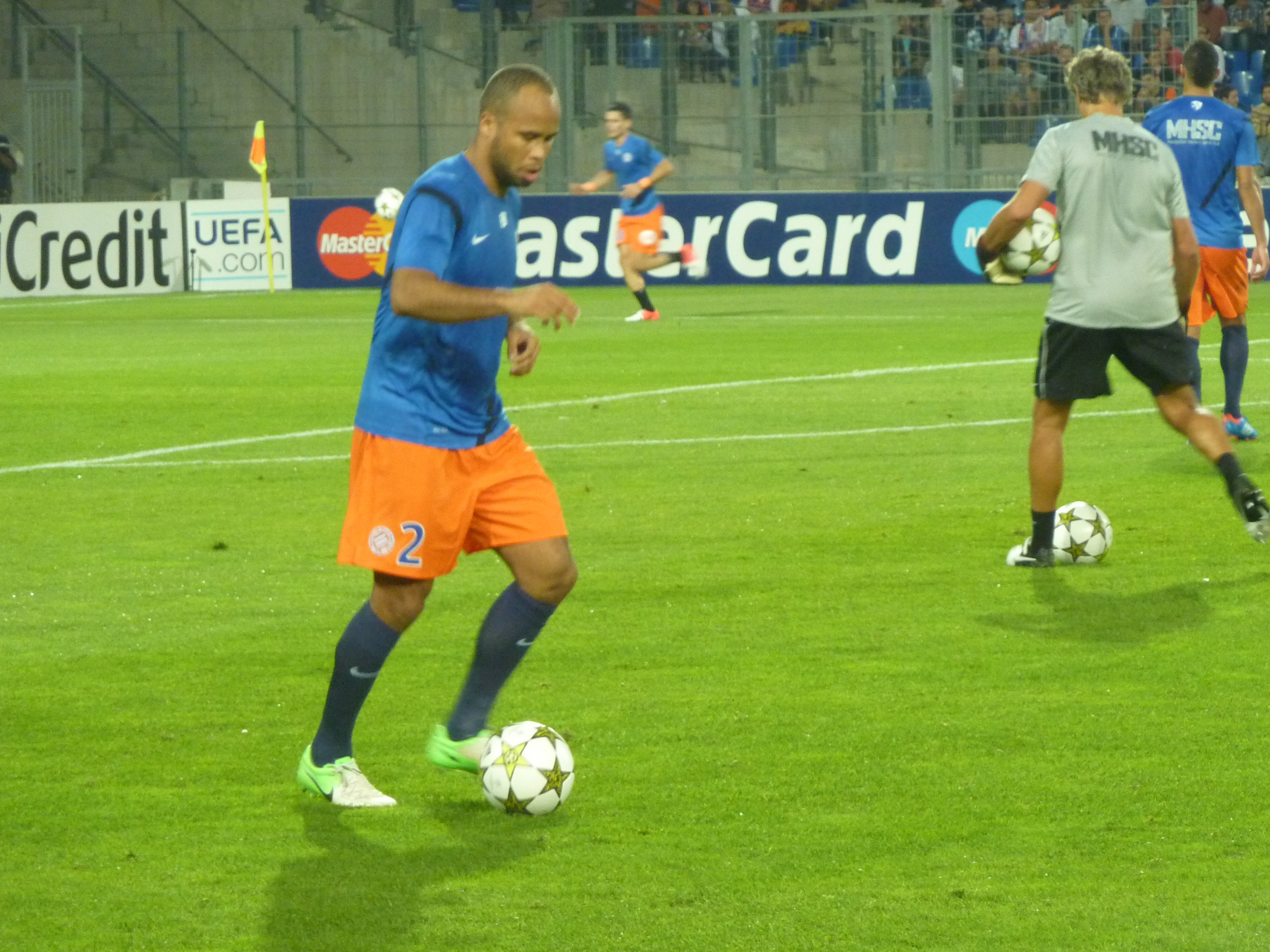 Garry Bocaly lors du match MHSC - Arsenal (Ligue des Champions, Phase de poules, 1er match, 18/09/2012